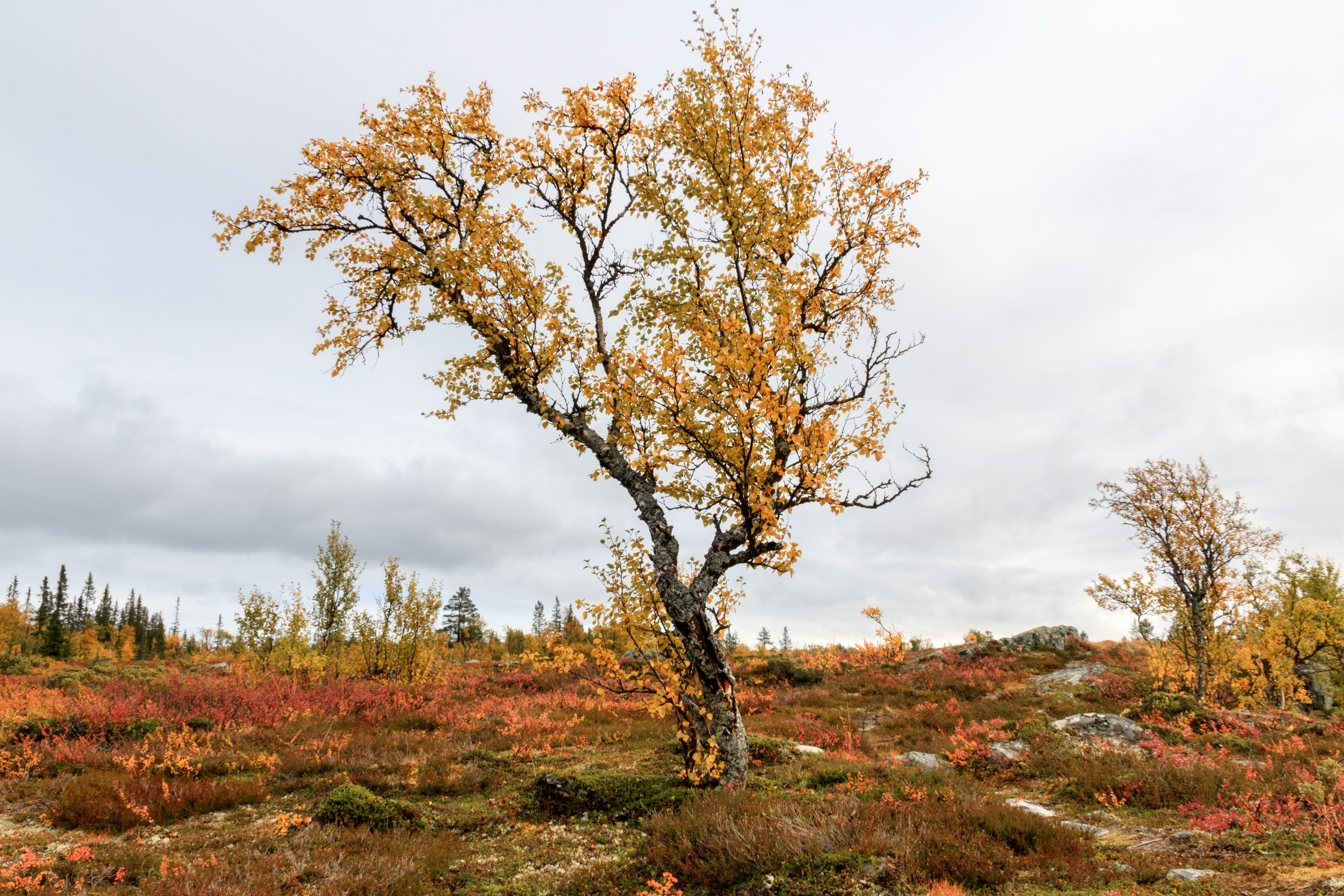 Höstfärgad fjällbjörk i Vålådalens naturreservat